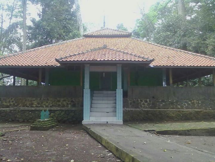 Makam Sunan Wanaperih